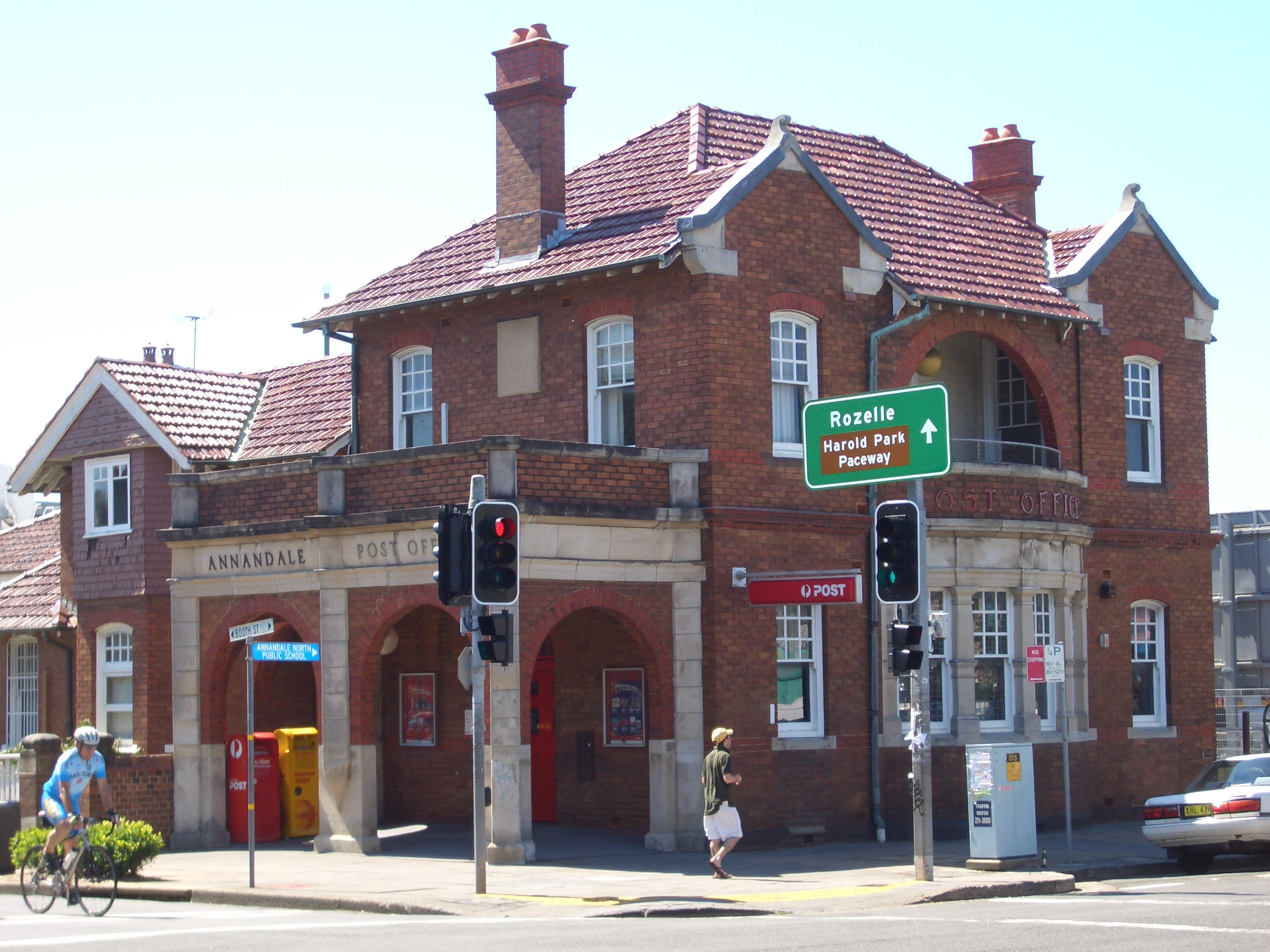 Annandale Post Office